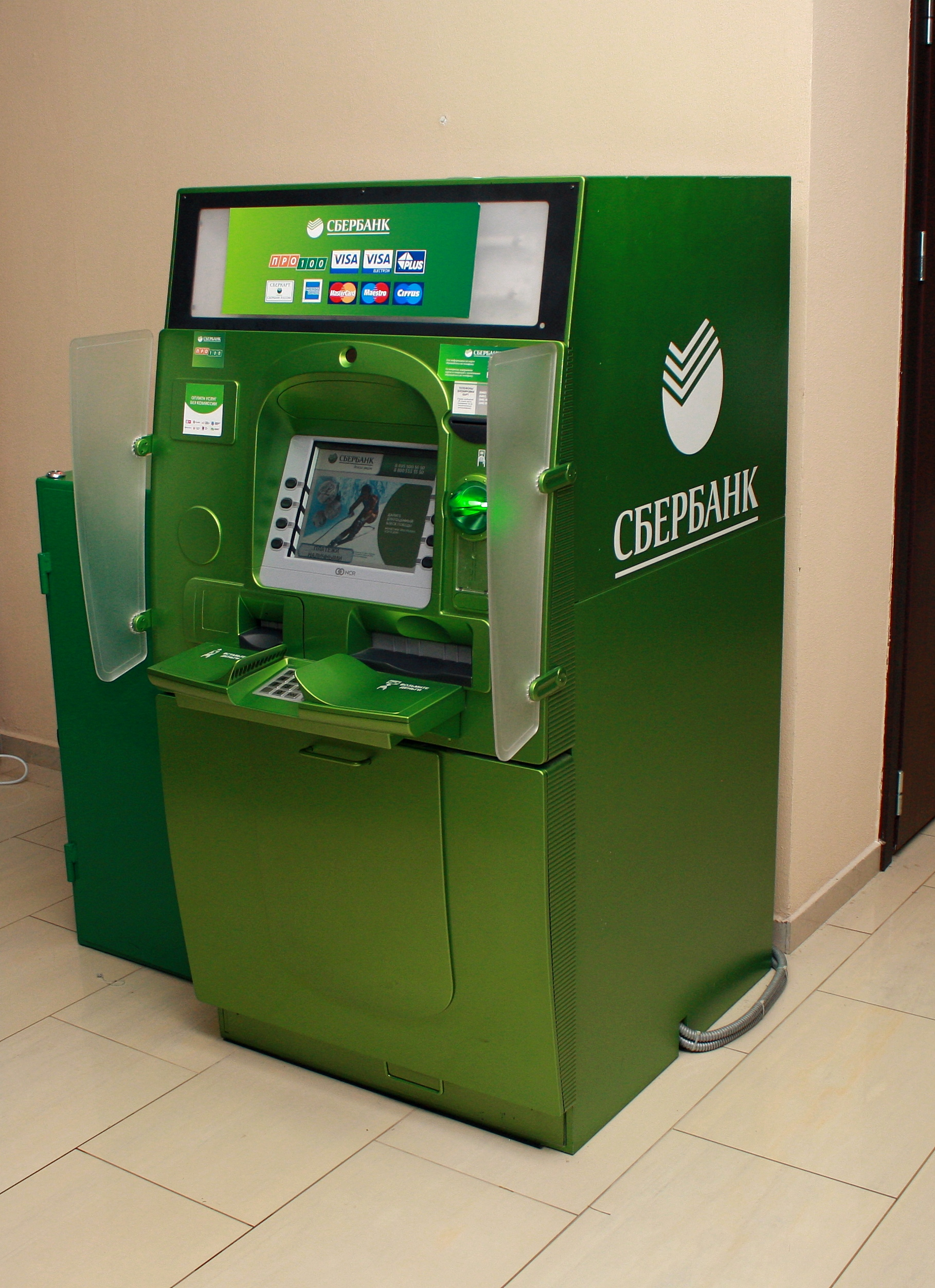 Один из современных банкоматов Сбербанка. Принимает купюры.